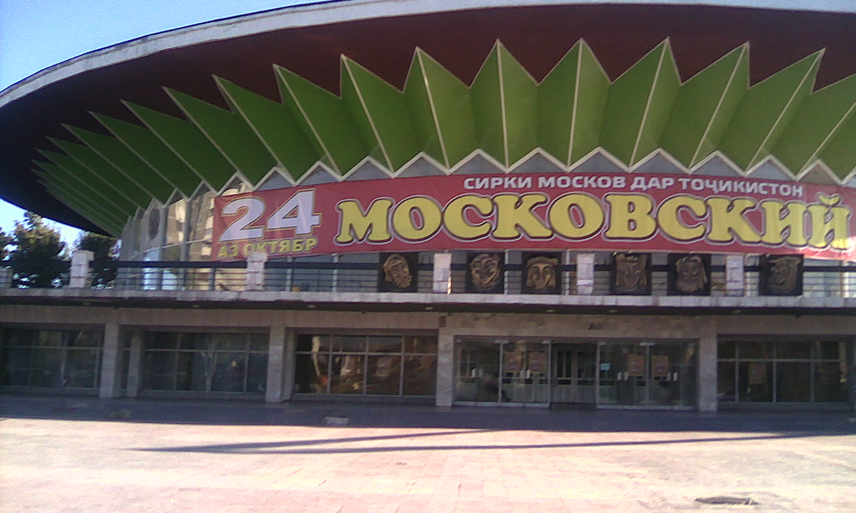 Здание Таджикского цирка в городе Душанбе, Таджикистан. Здание построено в 1970 году. Тоҷикӣ: Бинои Сирки Тоҷикистон дар Душанбе, Бинои сирк соли 1970 бунёд шудааст. Акс, соли 2015